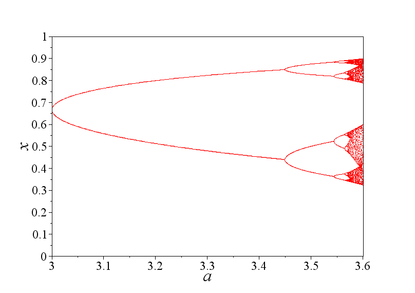 パラメータaが3から3.6までのロジスティック写像の分岐図